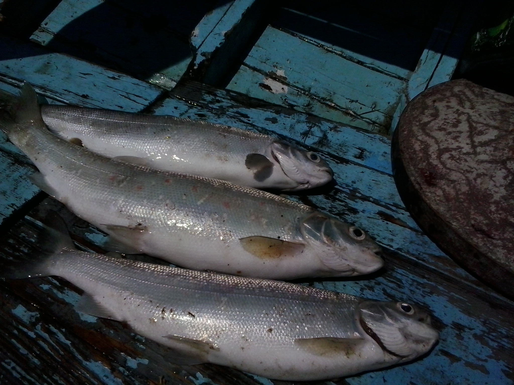 Belvica